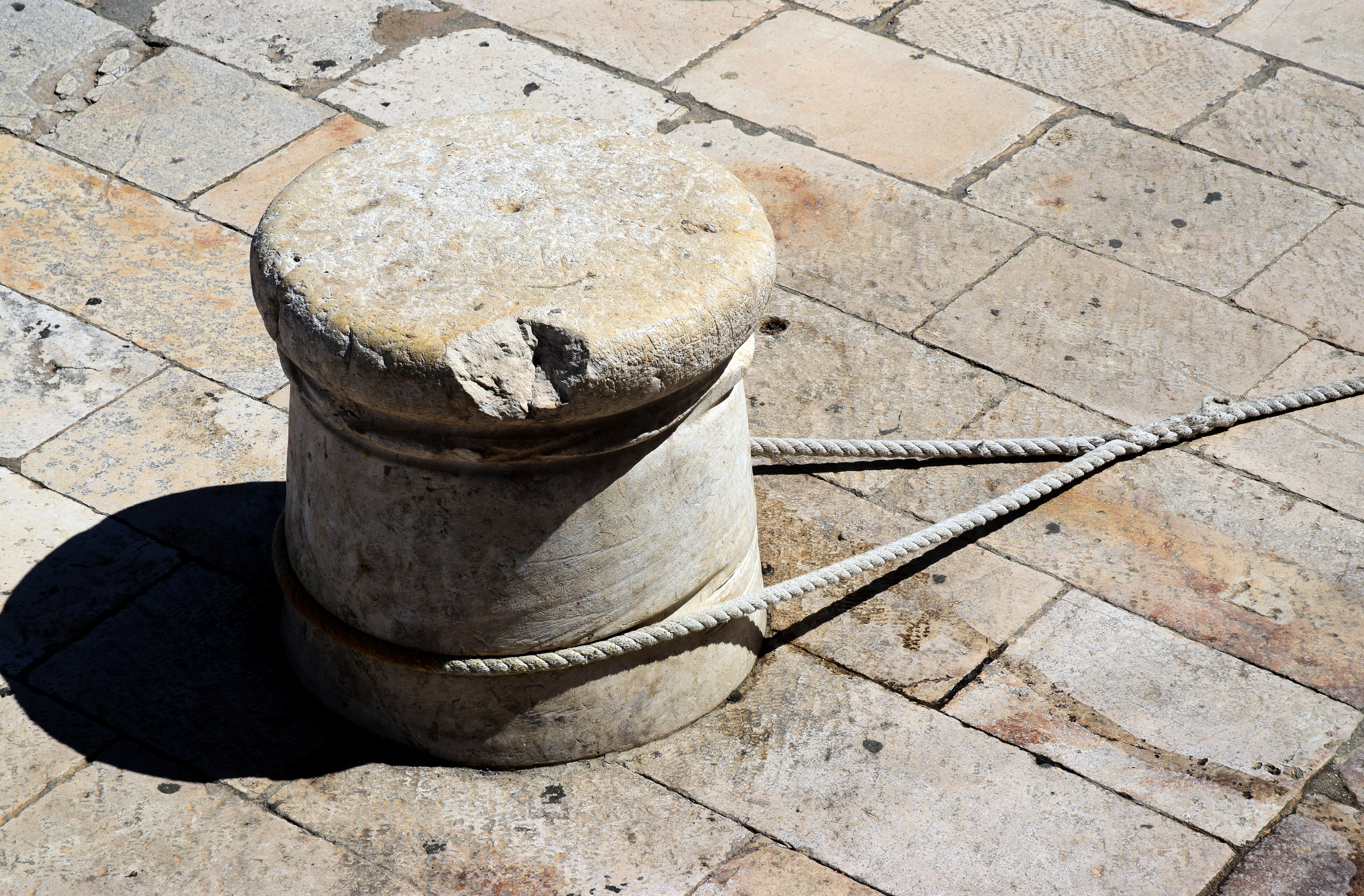 Poller im Hafen von Split